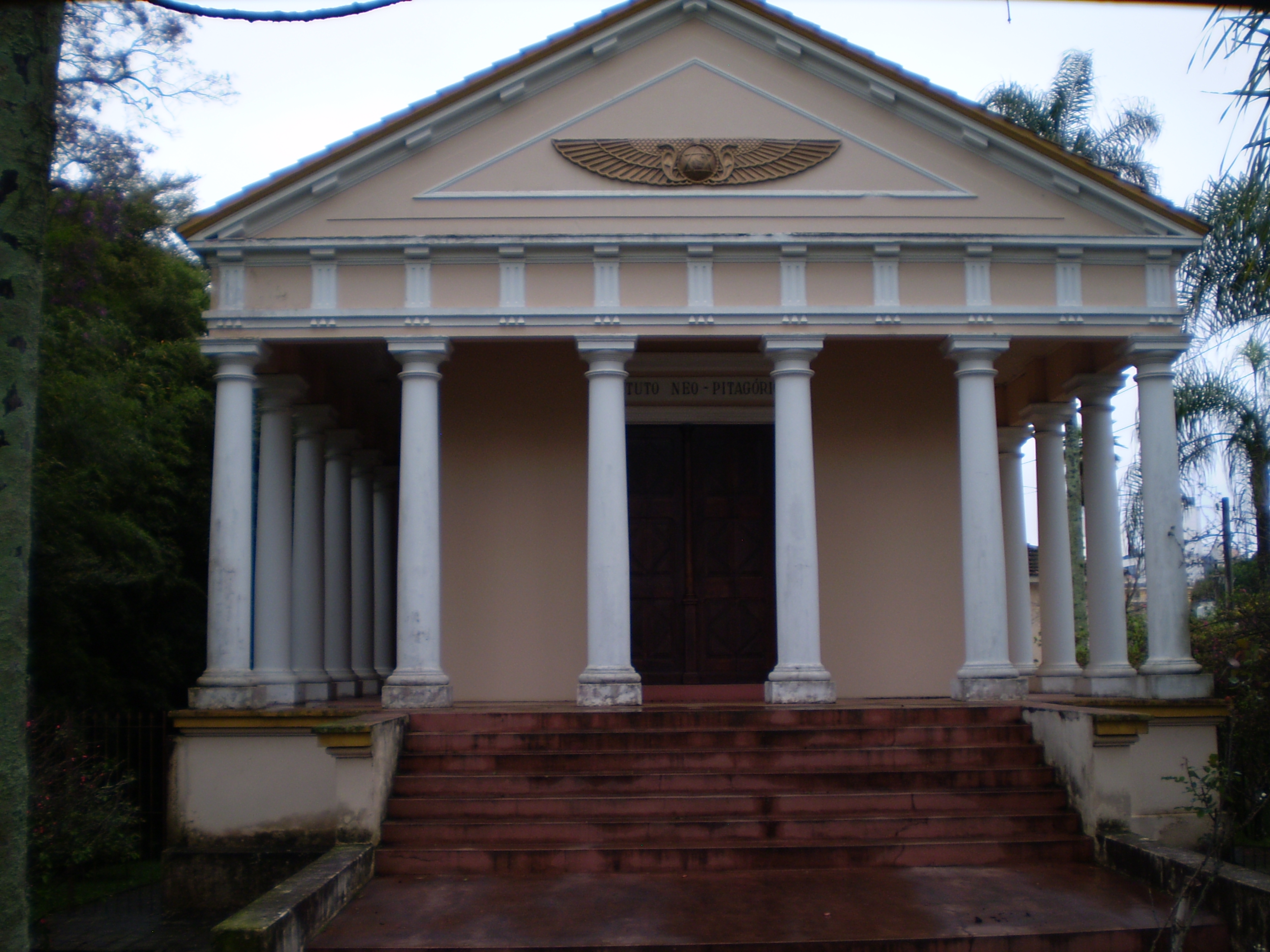 Templo das Musas - sede do Instituto Neo-Pitagórico em Curitiba